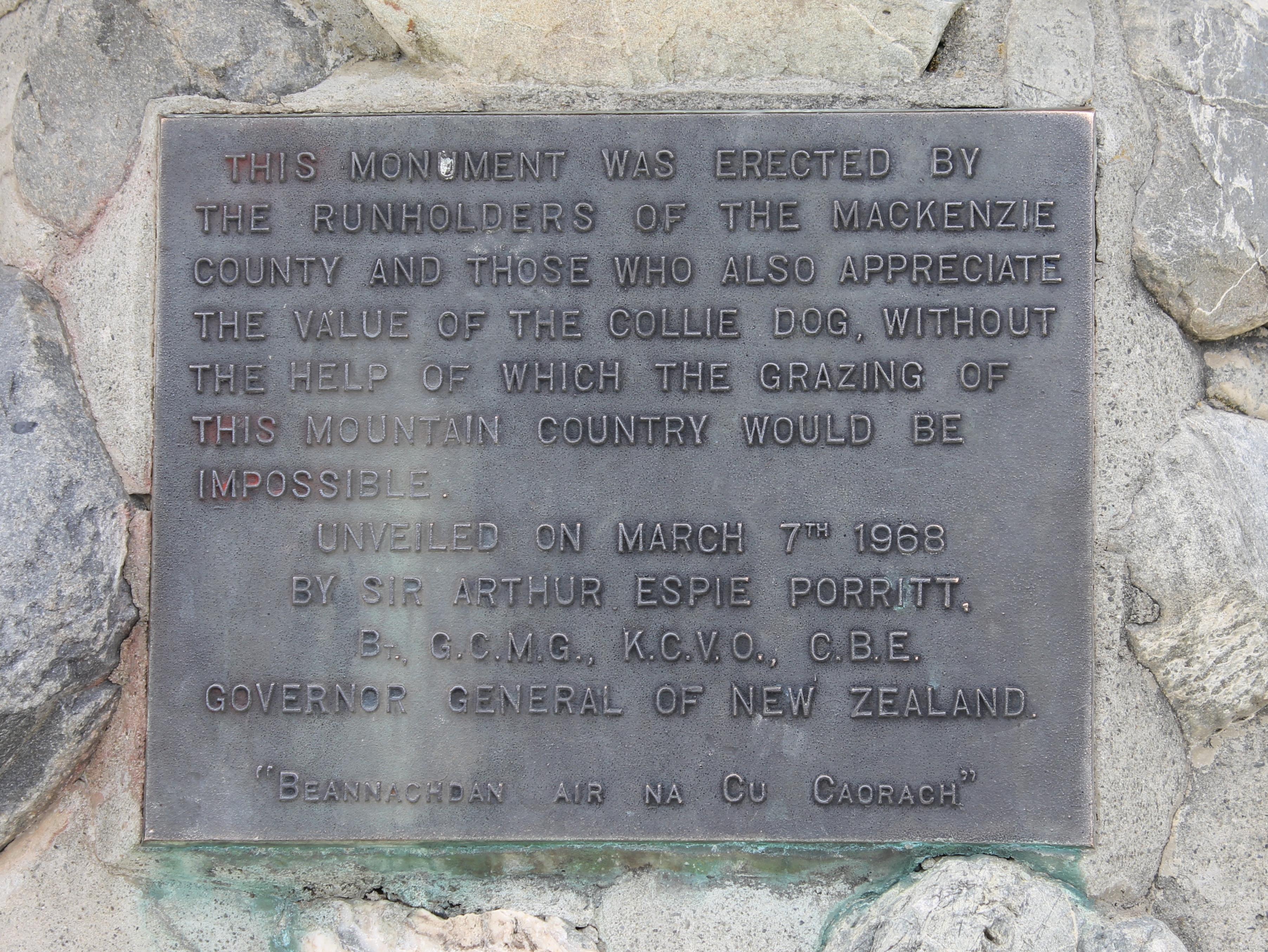 Plakette zur Statue eines Collie-Hütehundes; "Beannachdan air na cu caorach" (Gälisch): Blessings on the Sheep Dog.